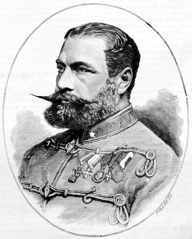 Henneberg Károly (1833–1888) honvéd huszár altábornagy, a honvéd lovasság megszervezője és első főfelügyelője portréja. Pollák Zsigmond metszete